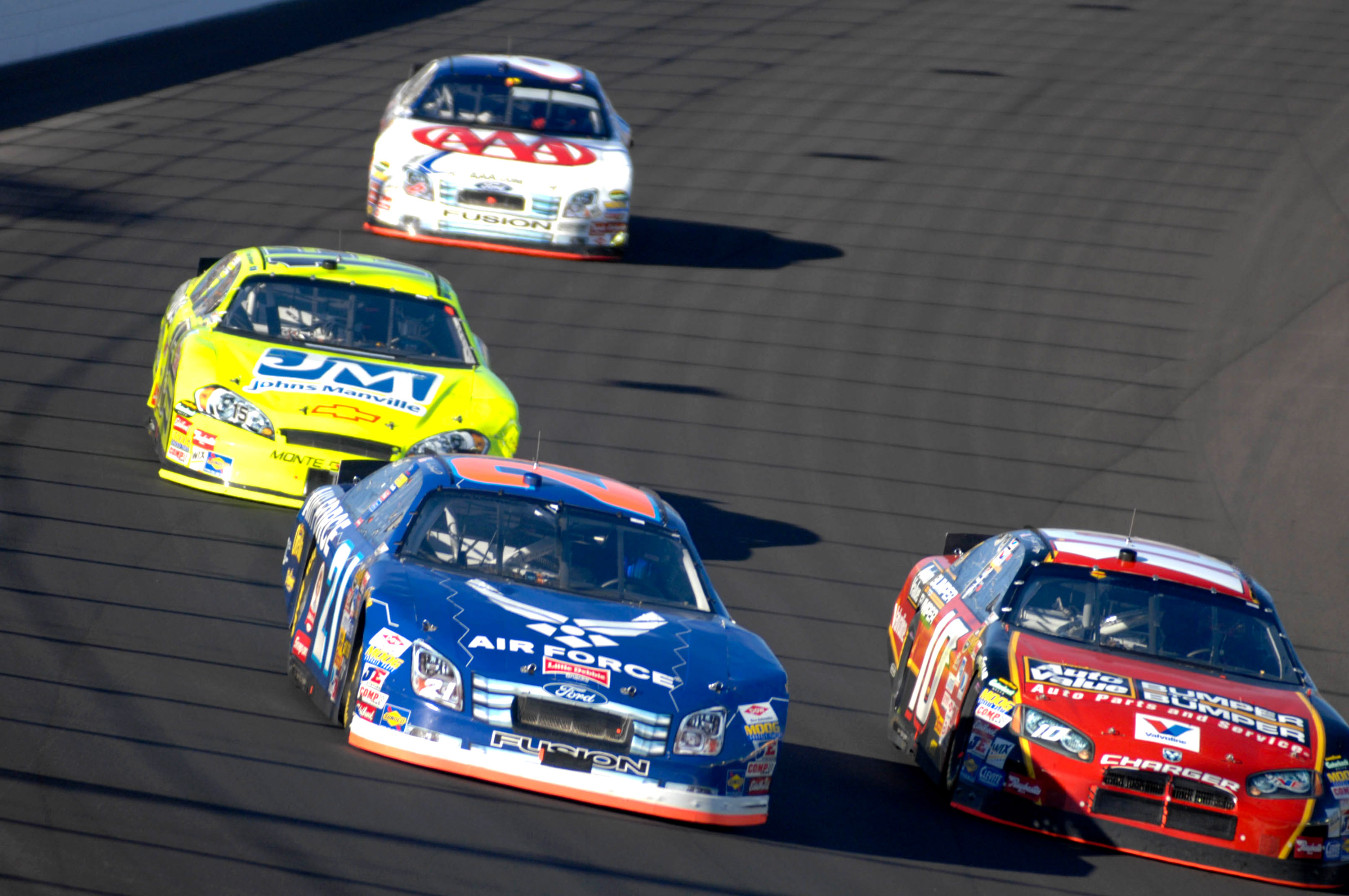 200 UAW Daimler-Chrysler 400